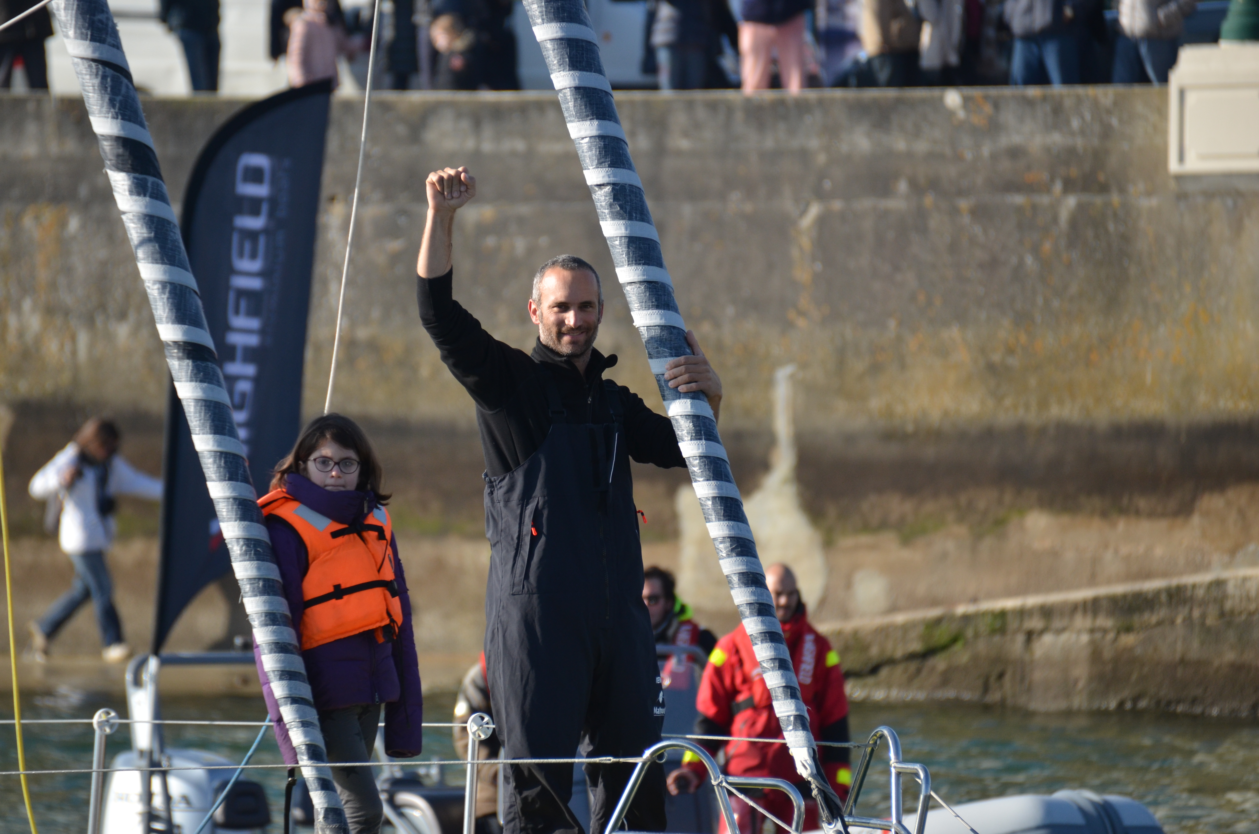 Arrivée de Fabrice Amedeo lors du Vendée Globe 2016-2017